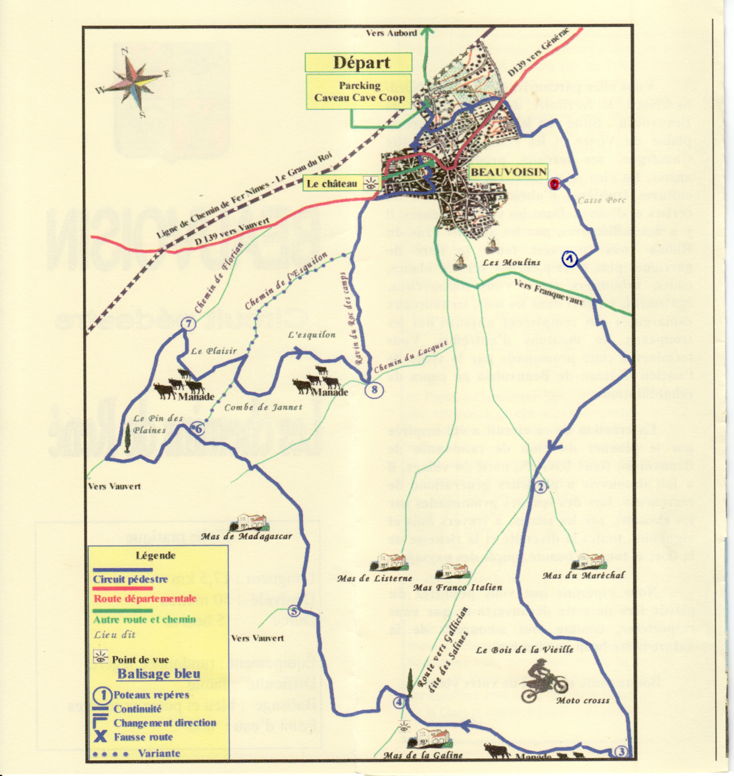 Plan de la balade de Beauvoisin, région de Nîmes